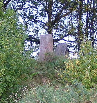 runsten och bautasten klafui PD